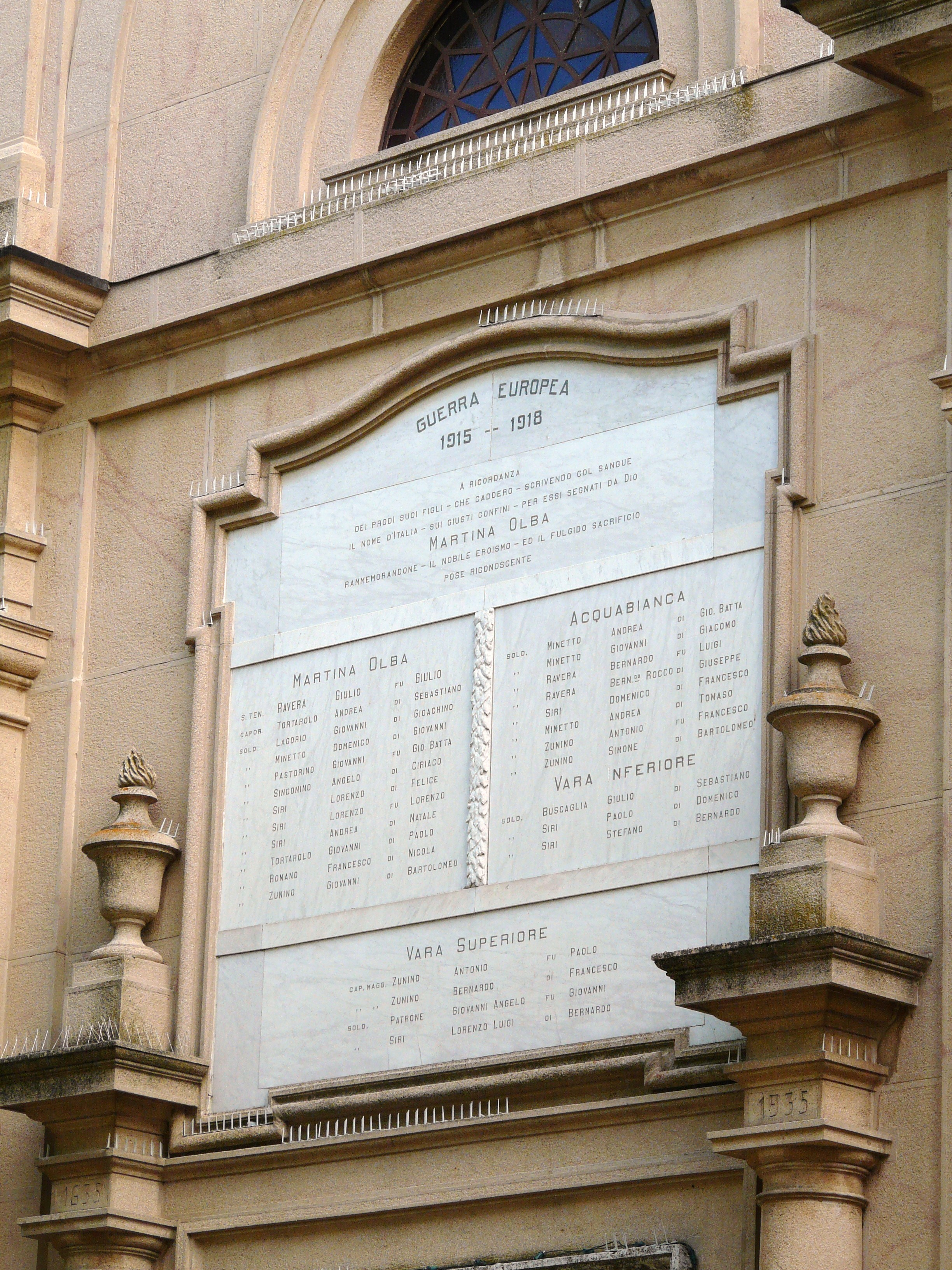 Facciata della chiesa di San Giacomo a Martina d'Olba, Urbe, Liguria, Italia